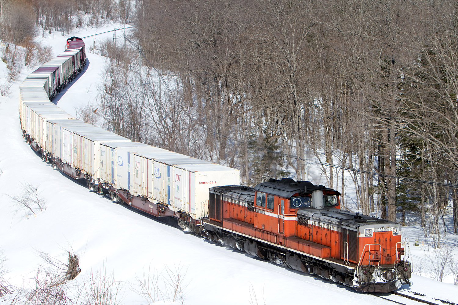 かつてDD51牽引で運転されていた石北本線貨物列車(生野～金華)